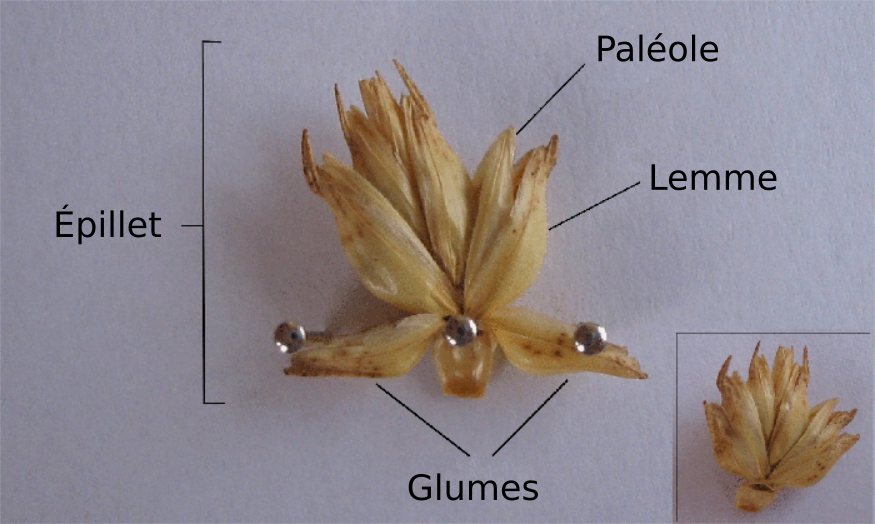 Épillet de blé (Triticum aestivum)